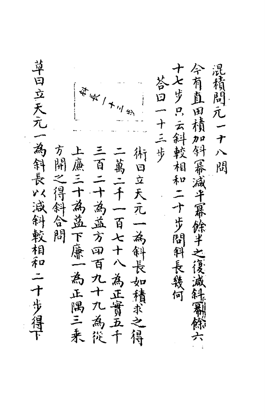 四元玉鉴混积问元